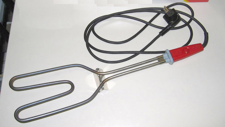 elektrischer Grillanzünder GAZ 700W / 230V~. Erzeugt innerhalb weniger Minuten sicher und sauber eine breite und gleichmäßige Glut